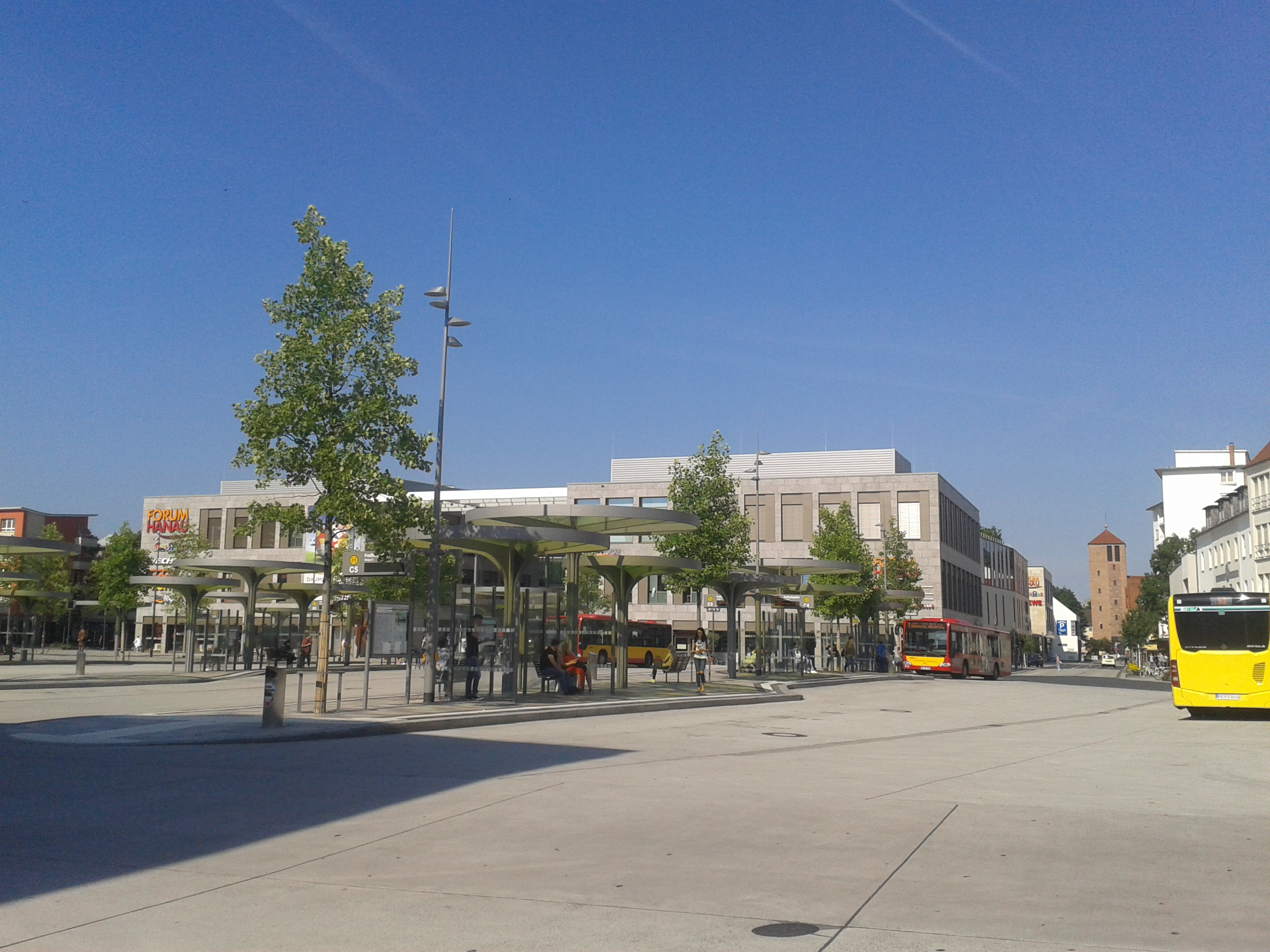 Freiheitsplatz mit Busbahnhof und Forum Hanau